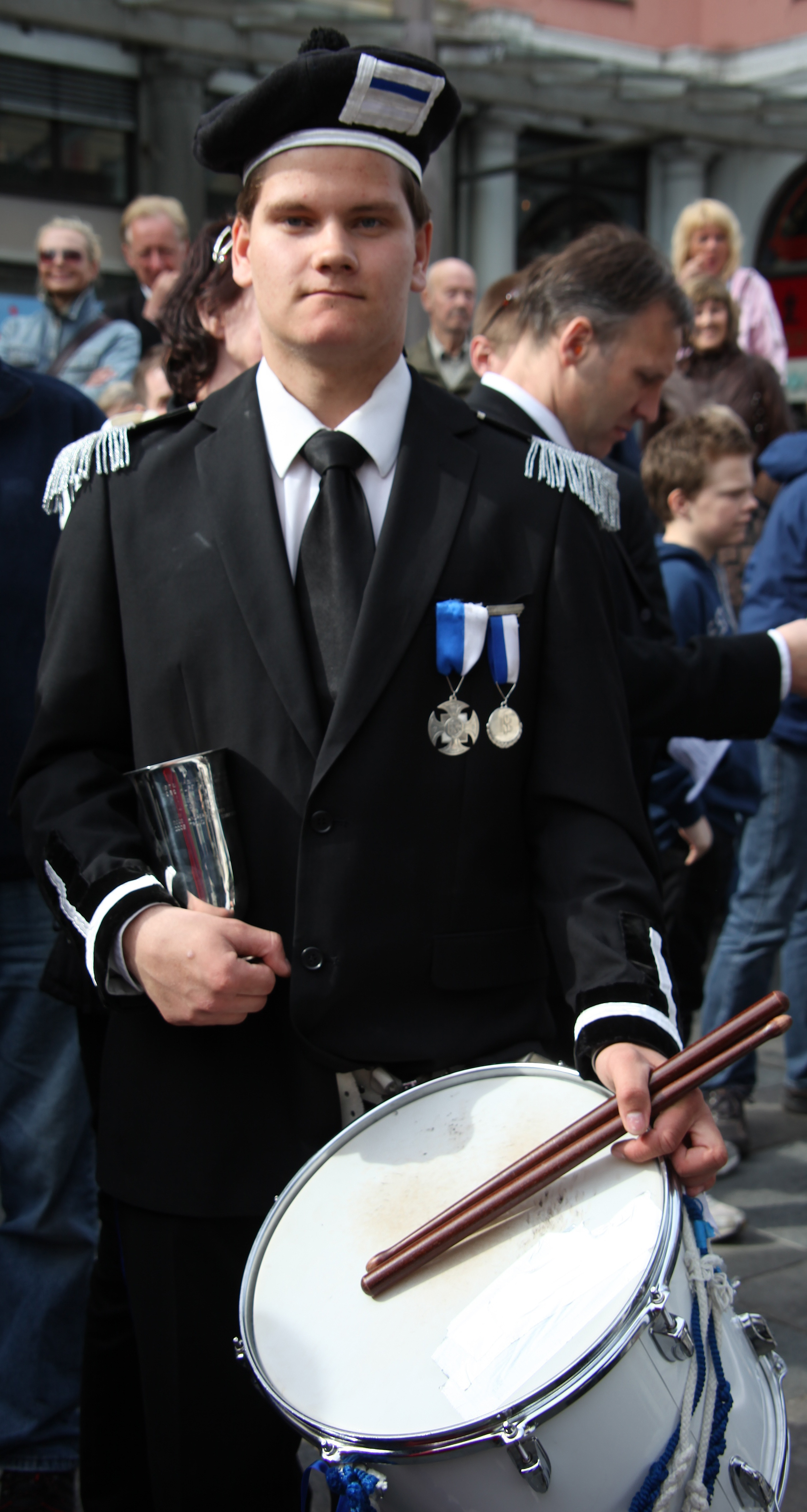 Vinner buekorpsenes dag 2010